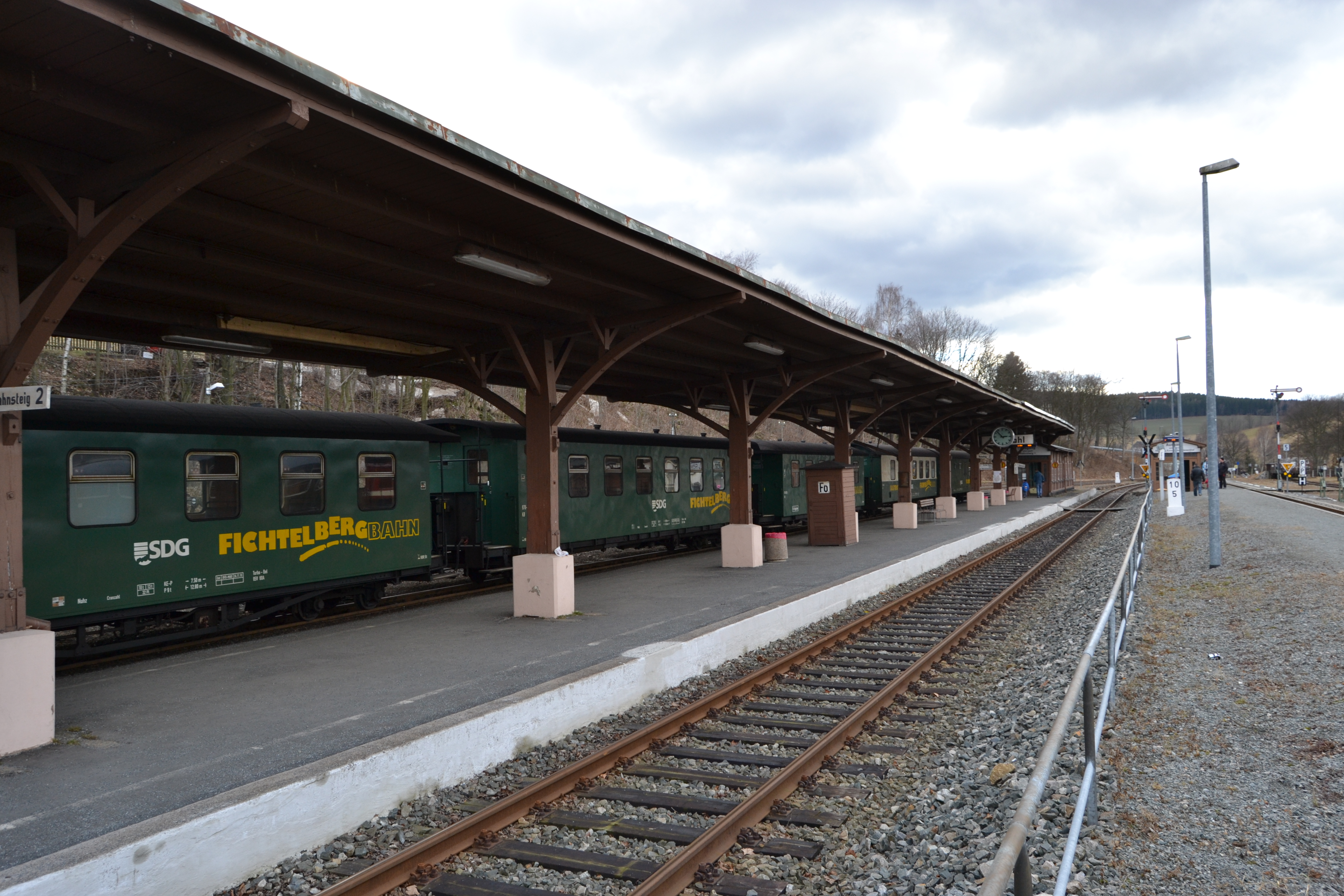 Bahnhof Cranzahl in Sachsen